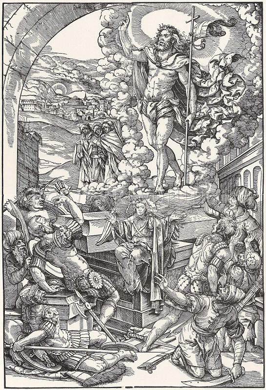 Heinrich Vogtherr der Jüngere, Die Auferstehung, um 1540, Holzschnitt 95 x 66 cm